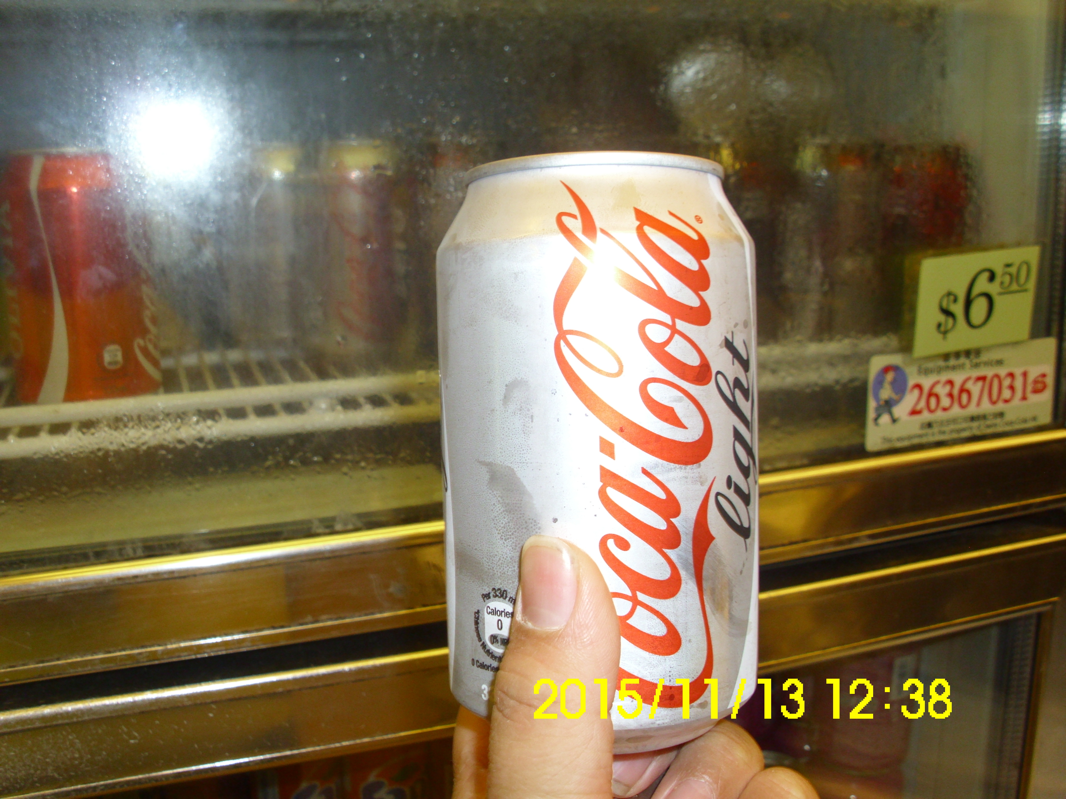 中文（中国大陆）: 原创照片，可口可乐